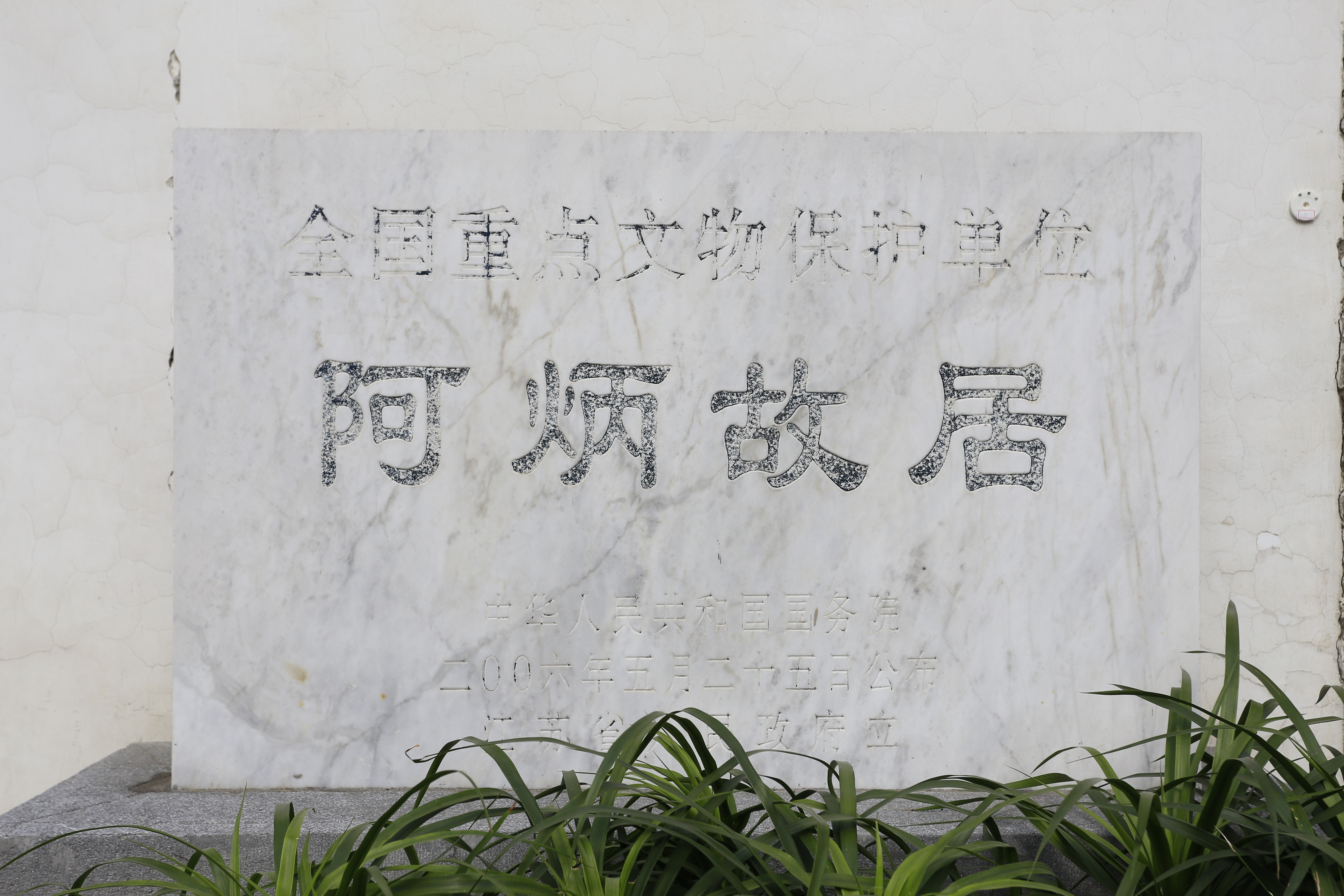 无锡阿炳故居—— 文保碑